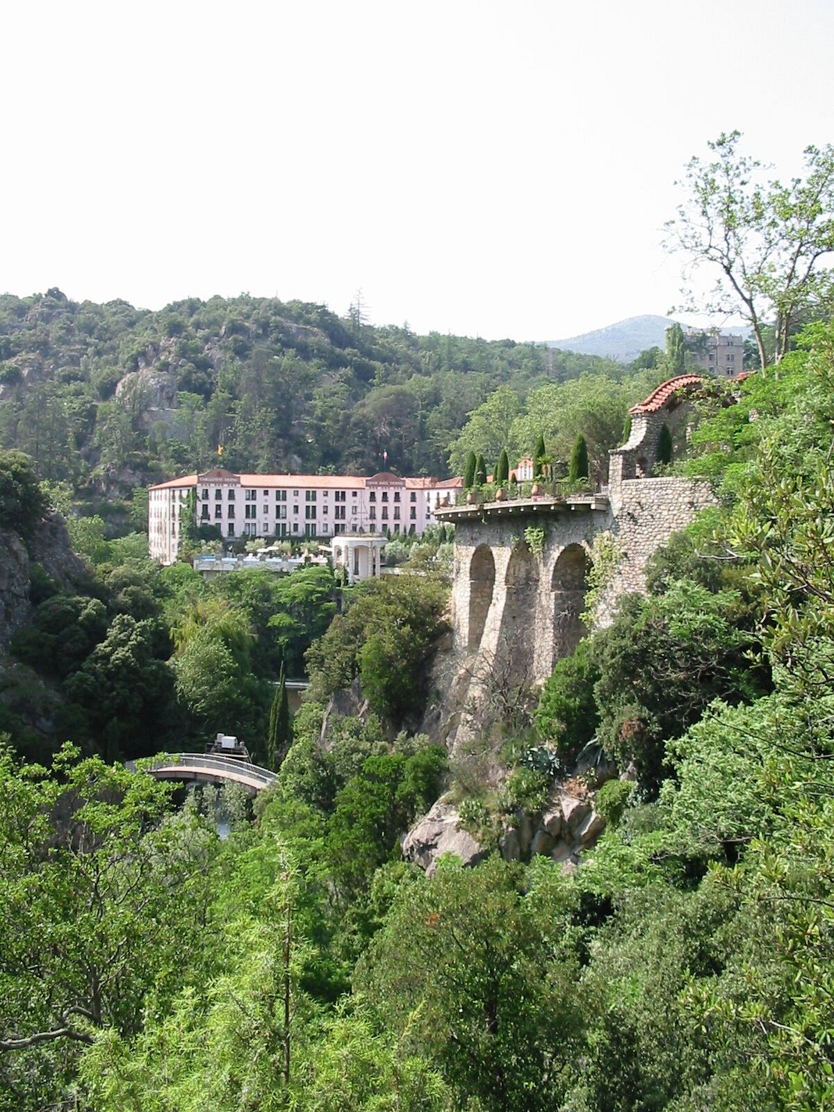 Molitg-les-Bains, Pyrénées-Orientales, France